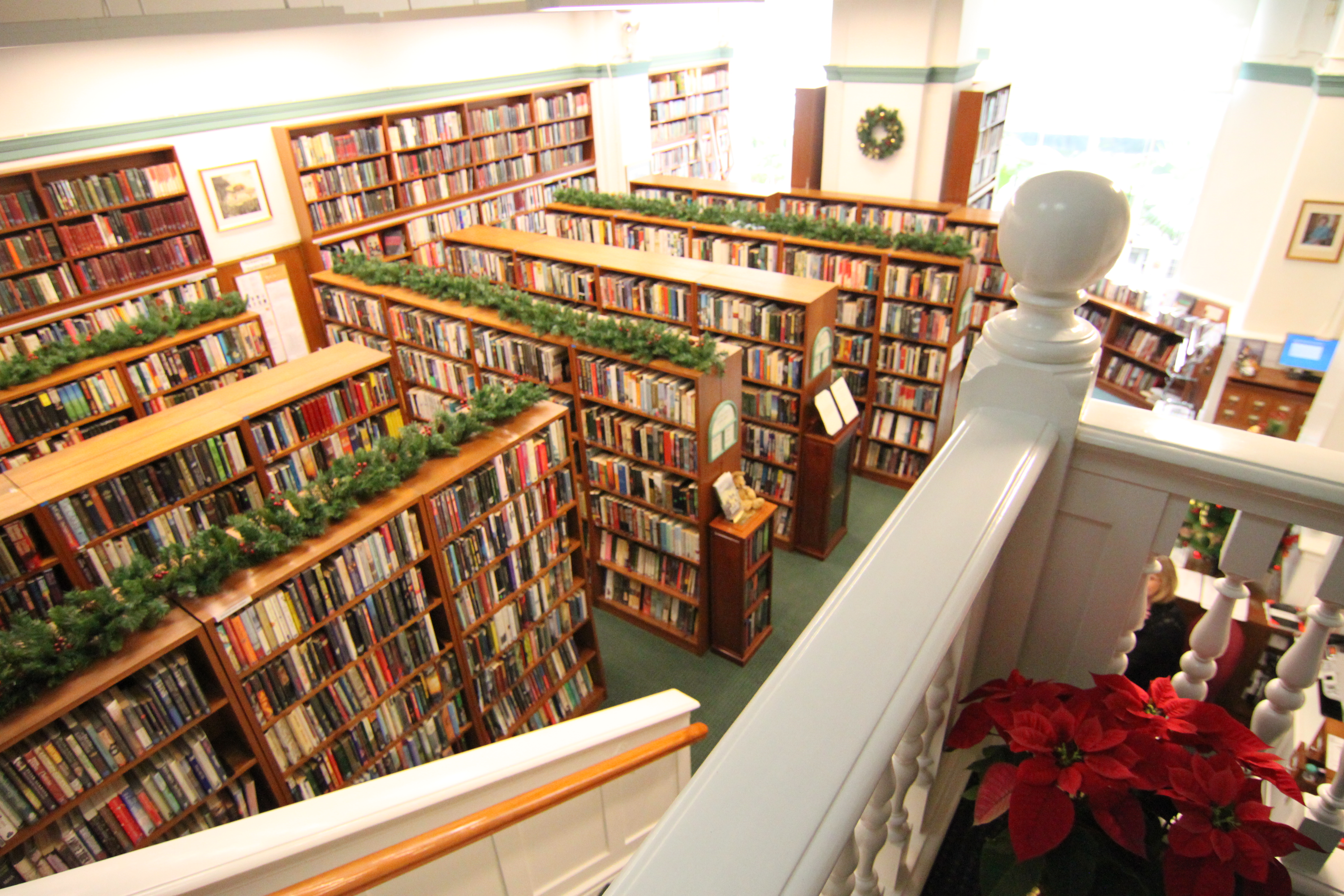 梅夫人婦女會圖書館